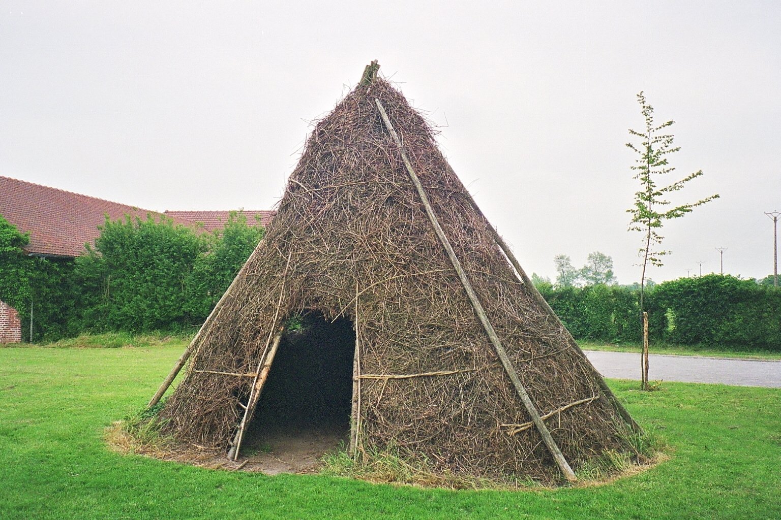 Abri temporaire des bucherons en forêt d'Eu ( reconstitution)